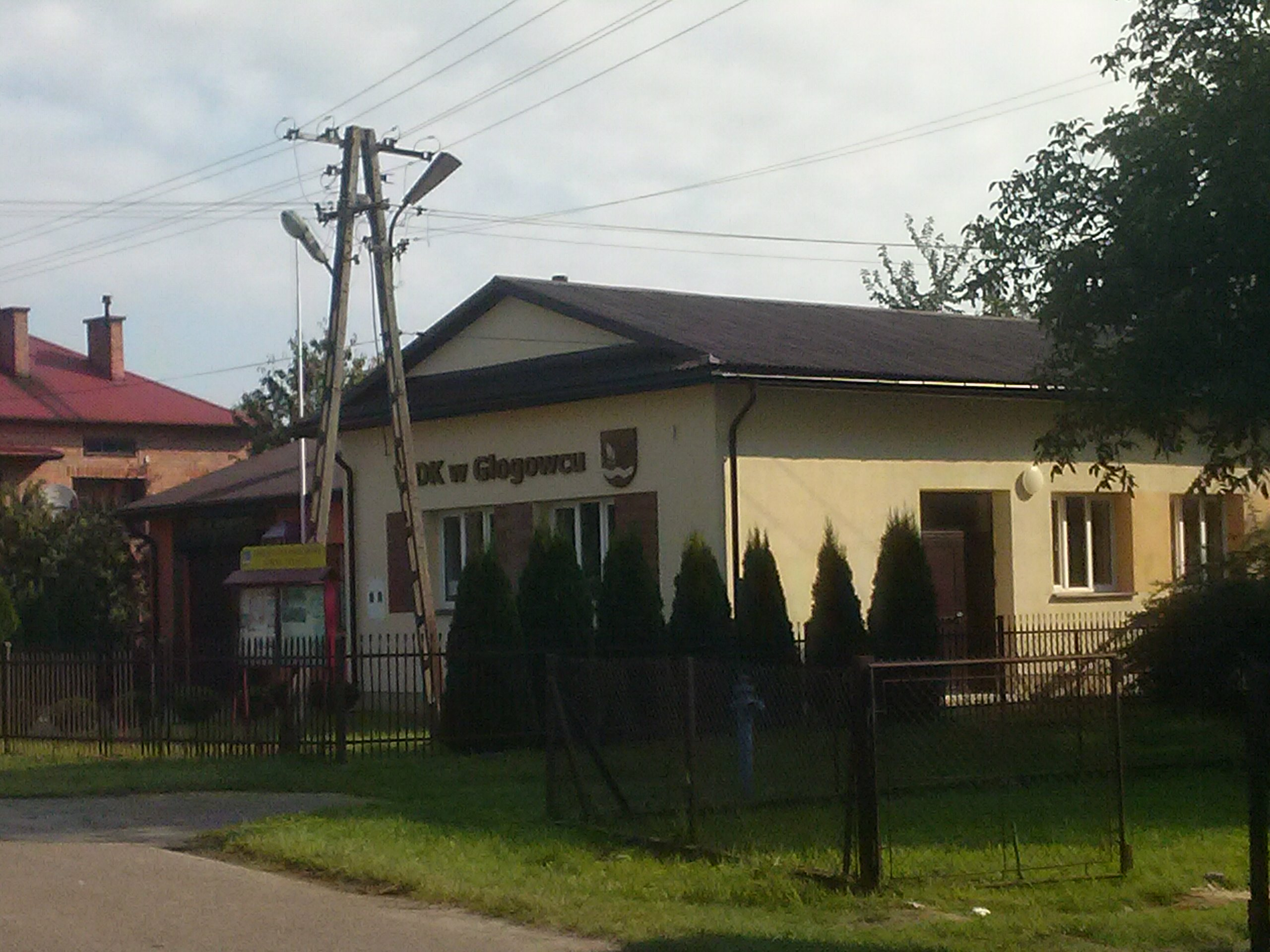 Wiejski Dom Kultury w Głogowcu